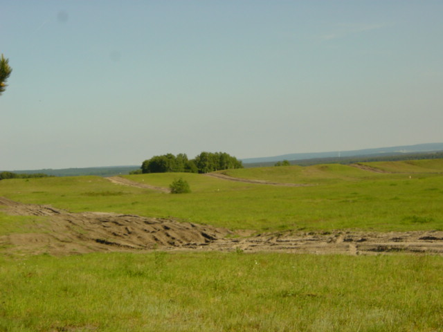 Senne, selbst fotografiert